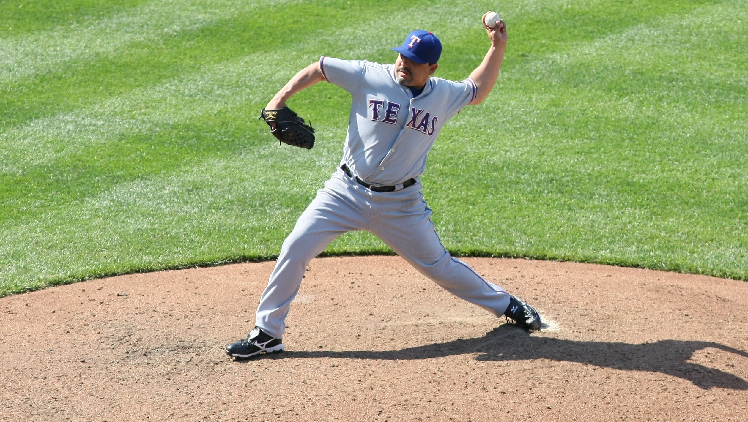 Eddie Guardado